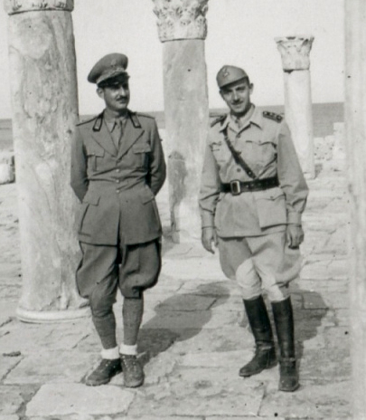 Tenente Alessandro Sagnotti, Libia.